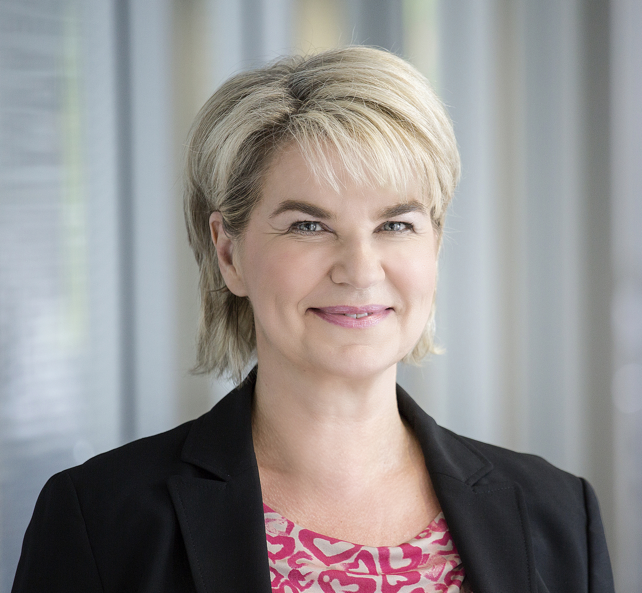 Journalistin und Managerin Elke Schneiderbanger